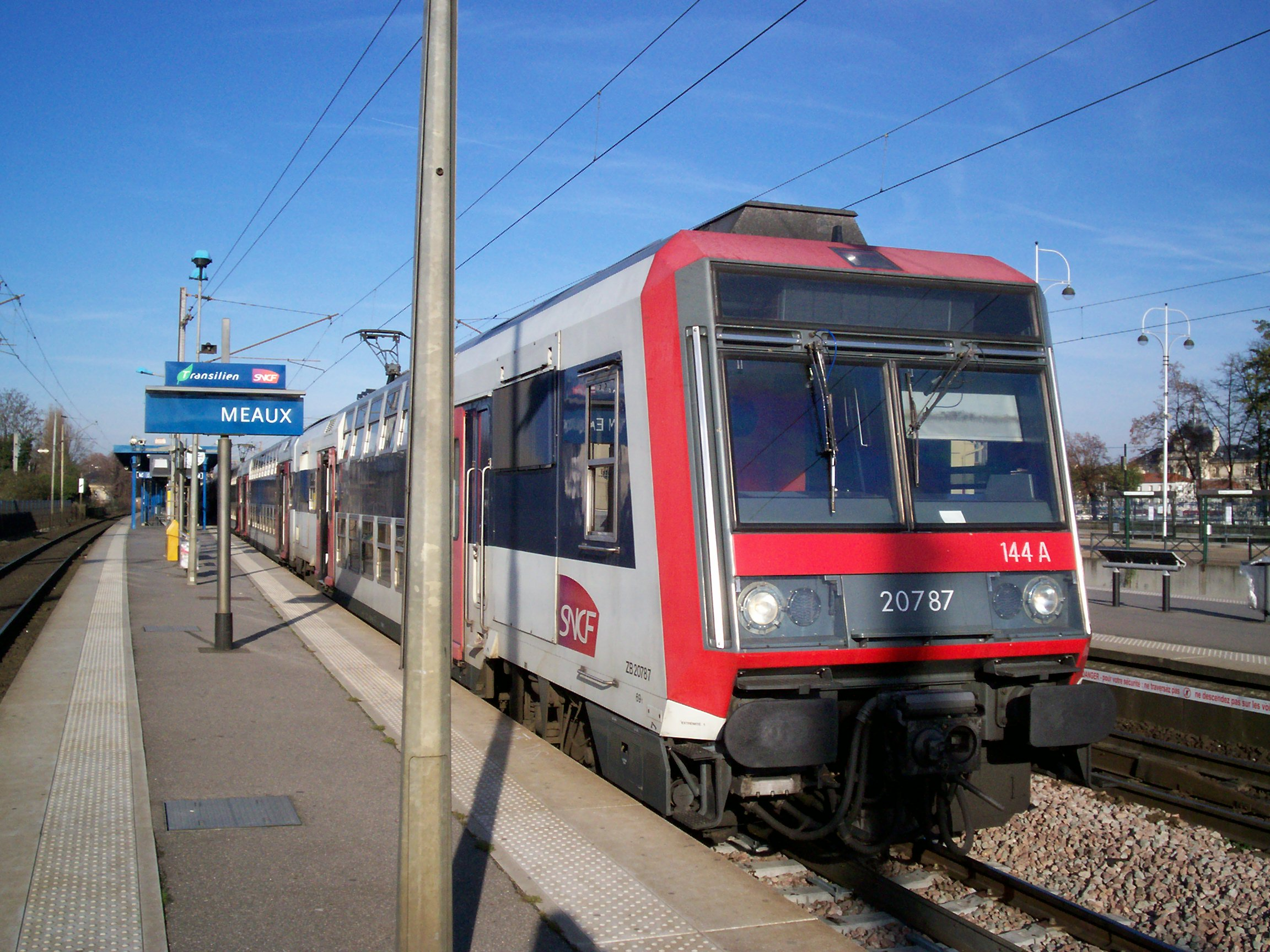 UM de Z 20500 prête à assurer exceptionnellement une liaison entre Paris et Meaux en desservant la totalité des gares du parcours.